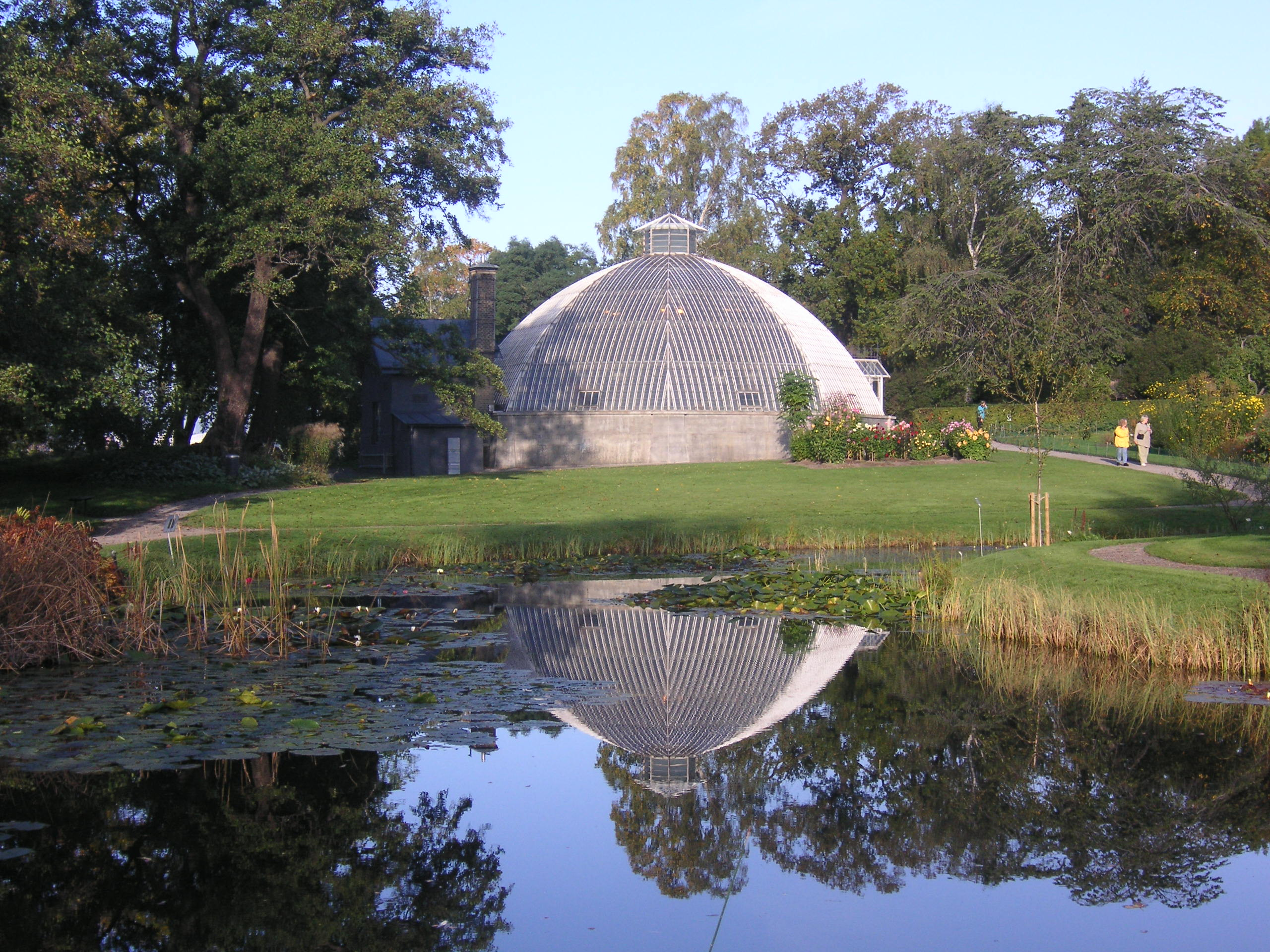 Victoria växthus i Bergianska trädgården i Stockholm.